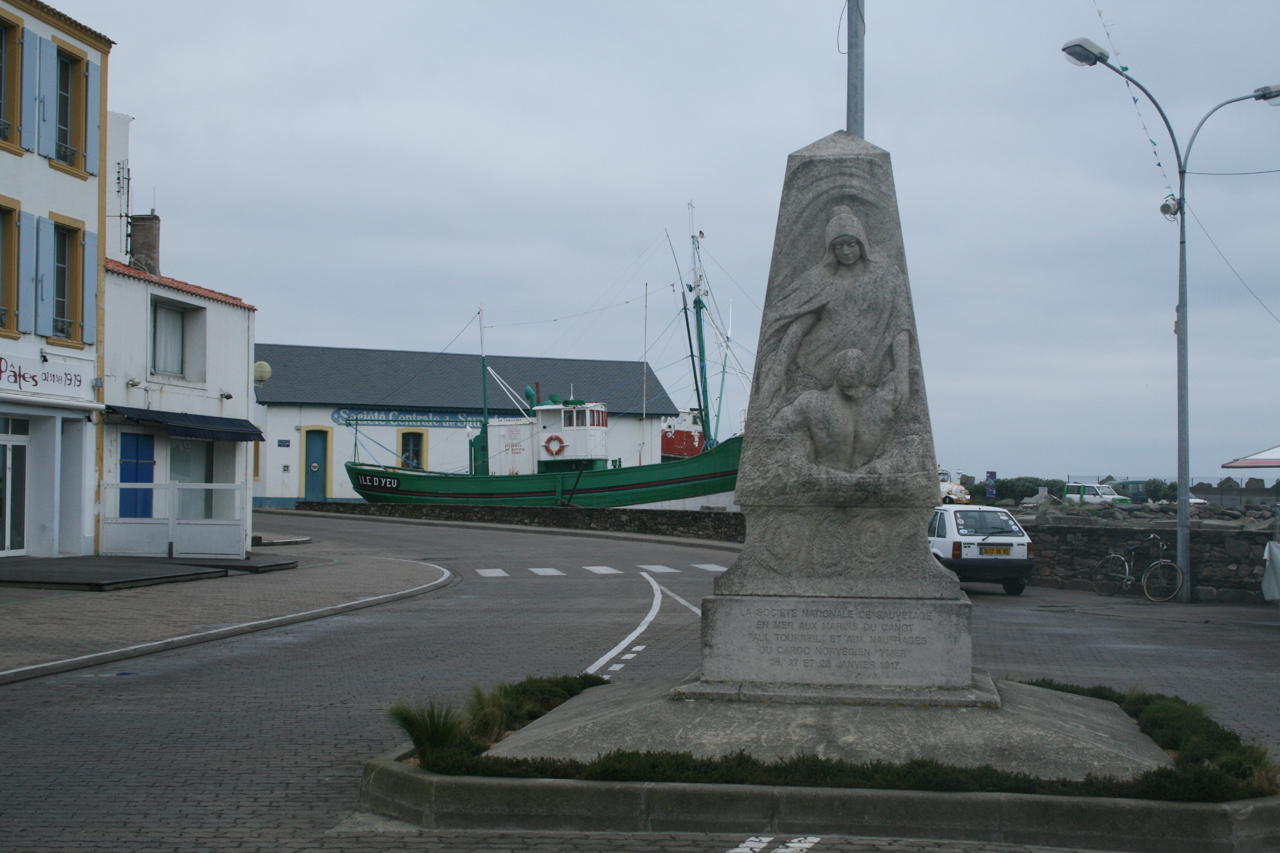 Monument commémorant le naufrage du cargo norvégien Ymer en 1917. Inauguré en juillet 1922. face La société nationale de sauvetage en mer aux marins du canot “Paul Tourreil” et aux naufragés du cargo norvégien “Ymer” 26, 27 et 28 janvier 1917 dos Aux marins français La norvège reconnaissante 1917 gauche Noel Devaud Pierre Girard Pierre Pelletier Emmanuel Turbe Edmond Pillet Emile Pillet droite Adolphe Izacard Joseph Renaud Olivier Plessis Baptiste Tonnel Jacques Taraud ? Alexandre Gouillet